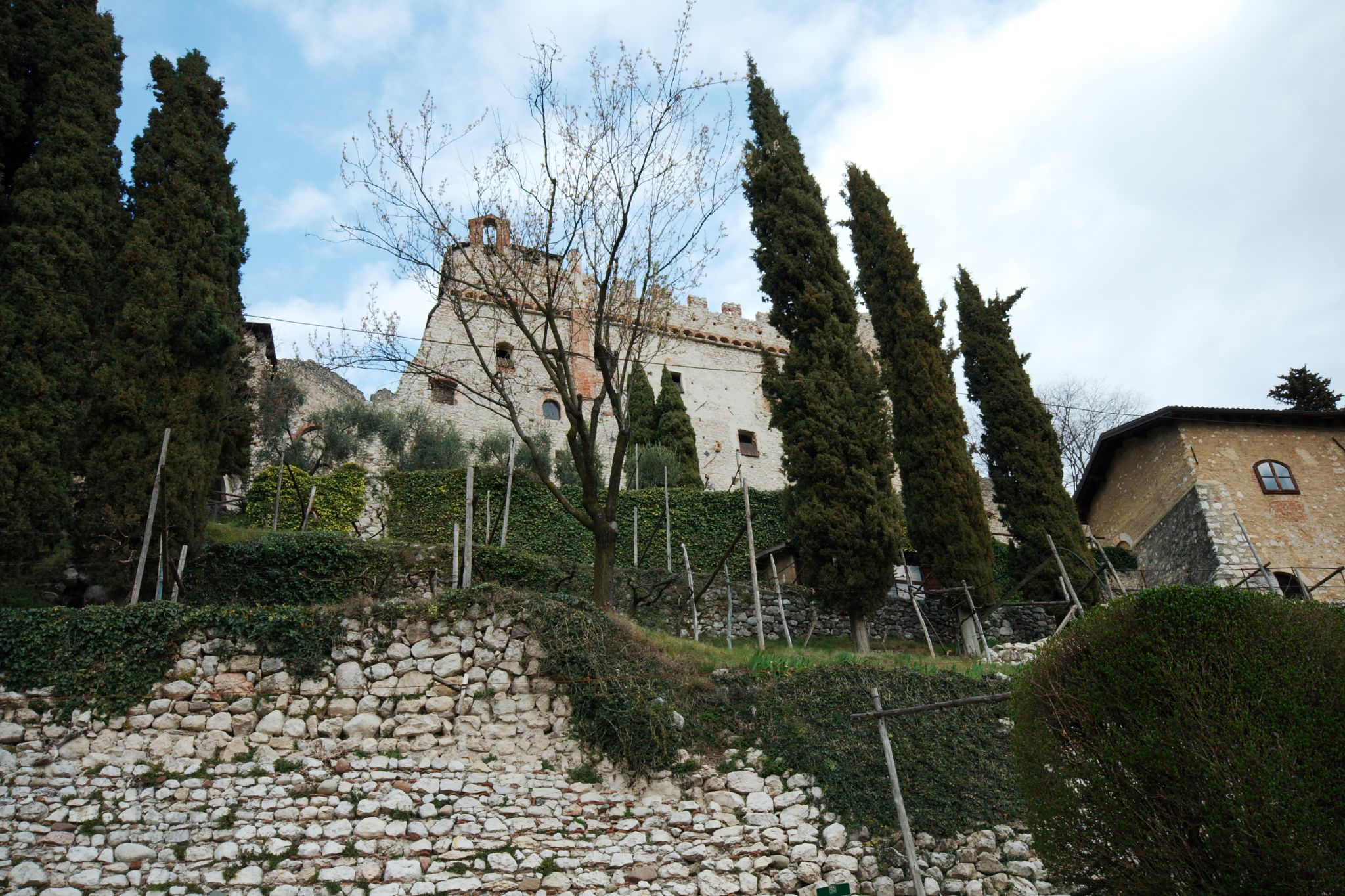 Il castello di avio. Avio, Trentino-Alto Adige. – Il mastio del castello, visto dall'ingresso al castello.